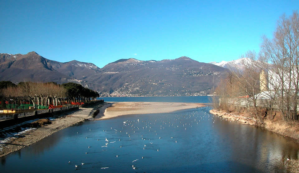 Foce del fiume Tresa a Luino/Germingaga